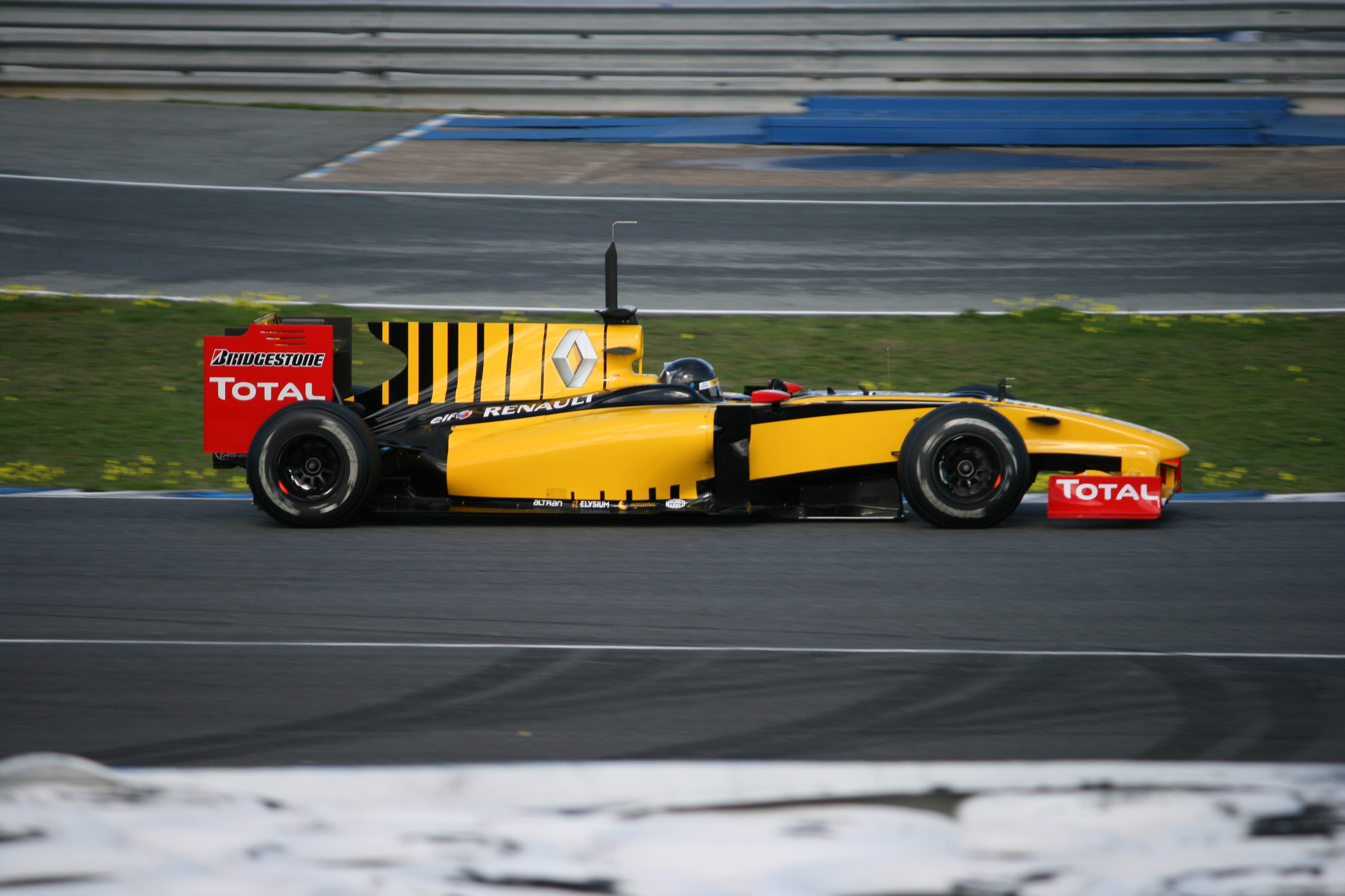 Robert Kubica testing for Renault F1 at Jerez, 11/02/2010.